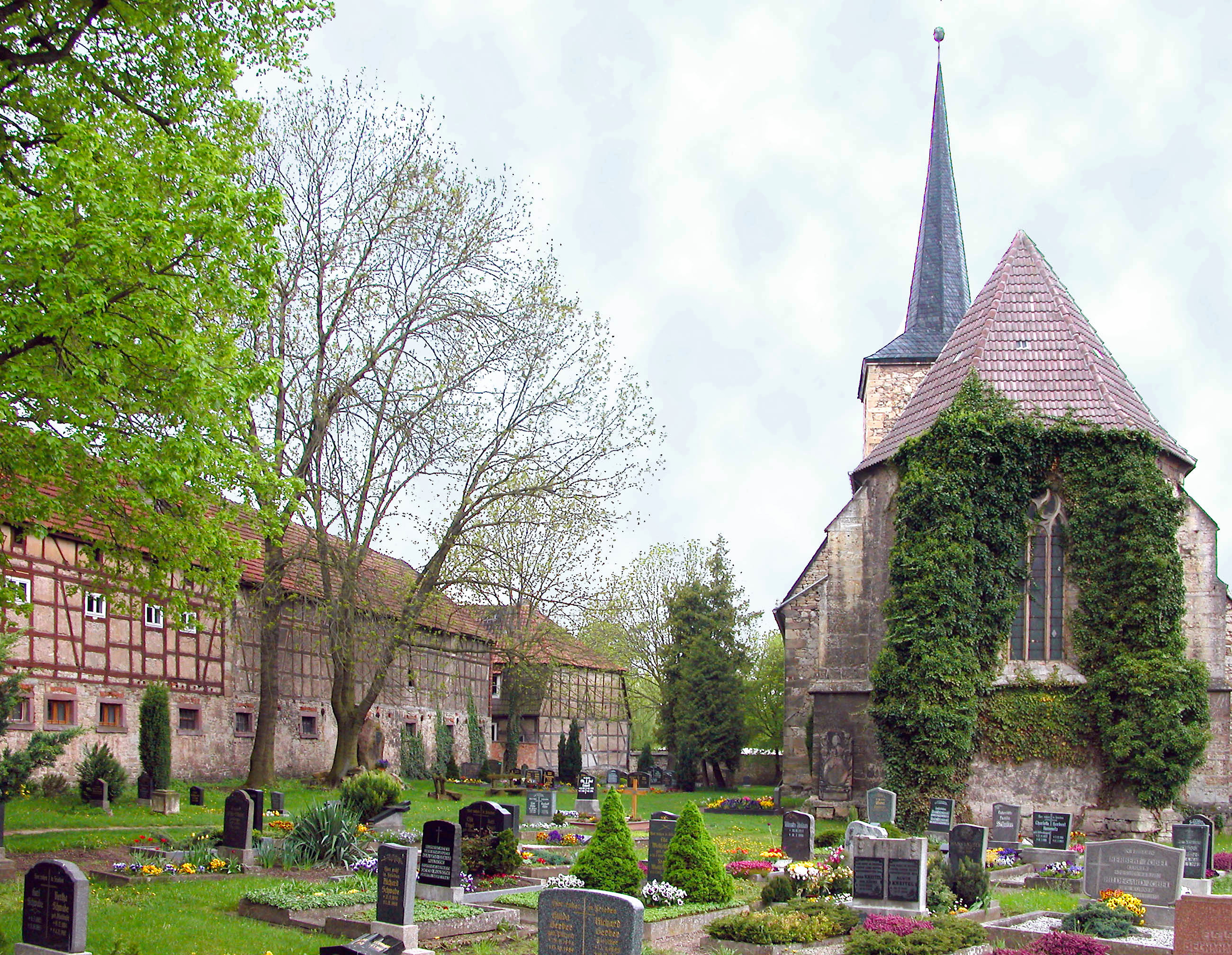 02.05.2004 06577 Gorsleben: Friedhofstor mit Sensenmann Uhr "Tod von Gorsleben", 1698. Links davon steht der "Schiefer-Hof". Der Schieferhof ist als Landsitz des Herrn Heinrich von Germar und seiner Frau Martha von Bendeleben errichtet worden. Die Bauinschrift am Treppenturm zeigt das Jahr 1620. Herrenhaus eines ehemaligen Ritterguts. Der Schieferhof diente 1819/20 dem "Verein für Erforschung des vaterländischen Althertums in Kunst und Geschichte" - Thüringens ältestem und am 20. Juli 1819 in Bilzingsleben gegründeten Geschichtsverein - als Aufbewahrungsort von dessen Sammlung. [DSCN3139.JPG]20040502200DR.JPG(c)Blobelt